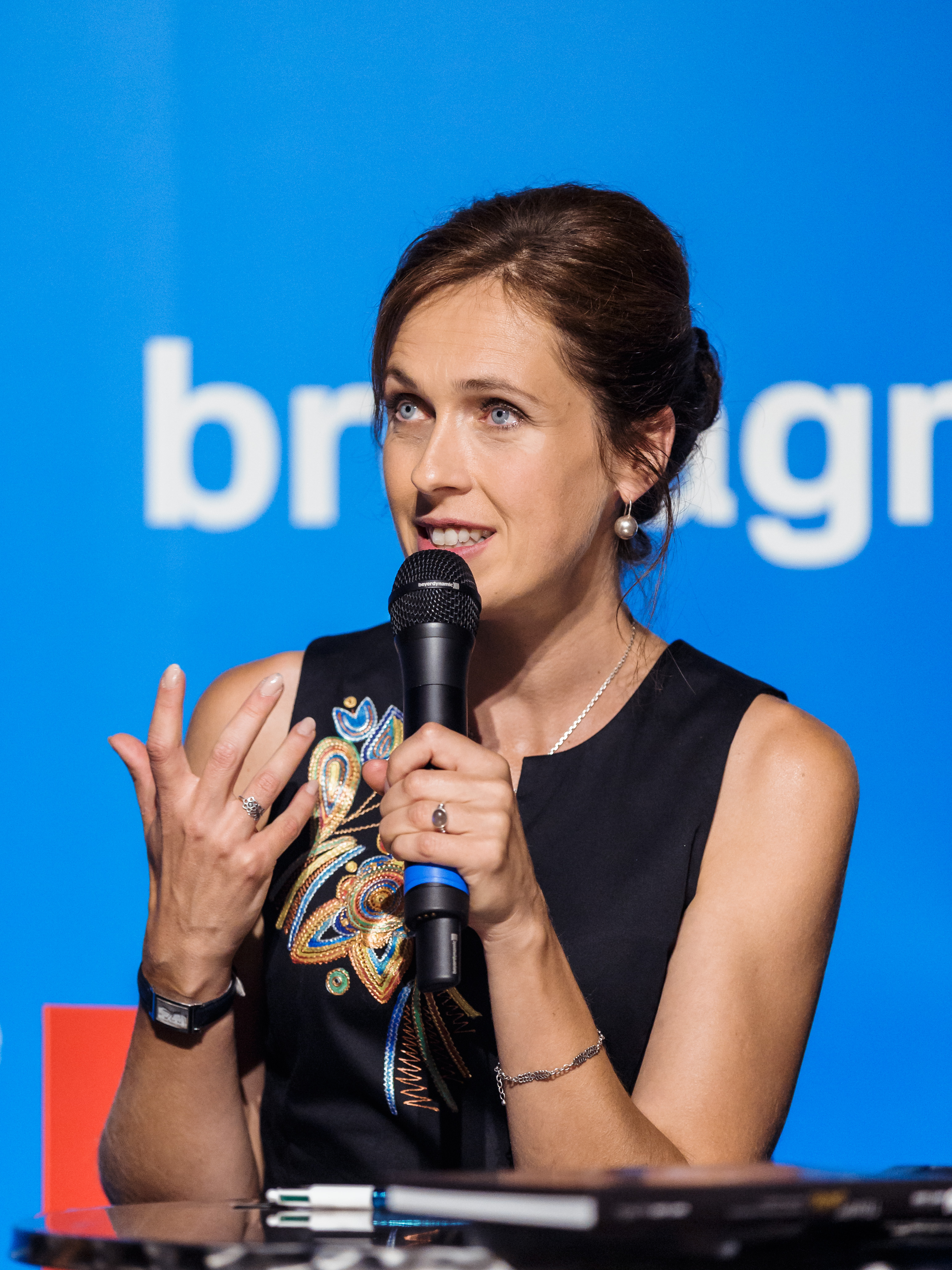 Le spectacle Kemen-Tu, organisé lors du festival de Cornouaille, au Pavillon de Penvillers à Quimper, est diffusé en streaming live par An Tour Tan et France 3 Bretagne le 22 juillet 2017. Les interview son menées par Goulwena an Henaff (France 3) et Tristan Gloaguen (War‘l Leur).